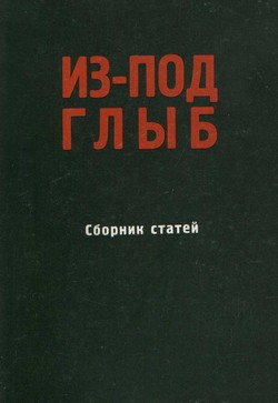 «Из-под глыб», 1974 г. обложка книги